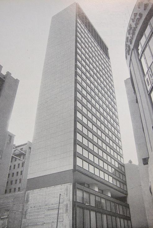 El Edificio San Martín 128, actual sucursal del Banco Supervielle.